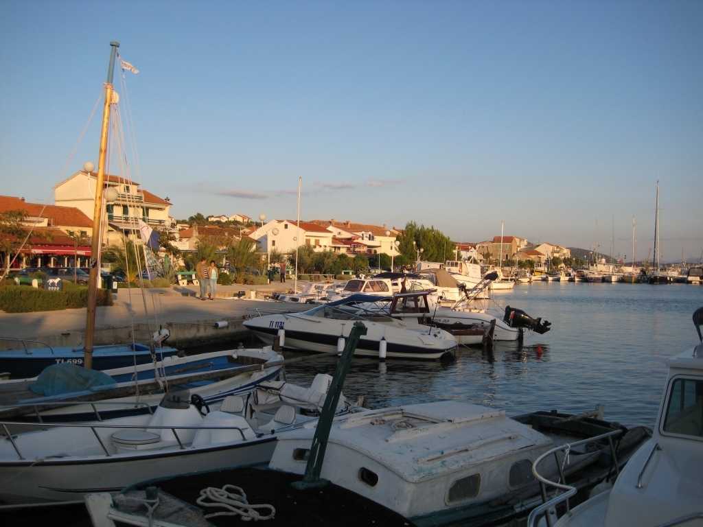 Jezera na Murteru